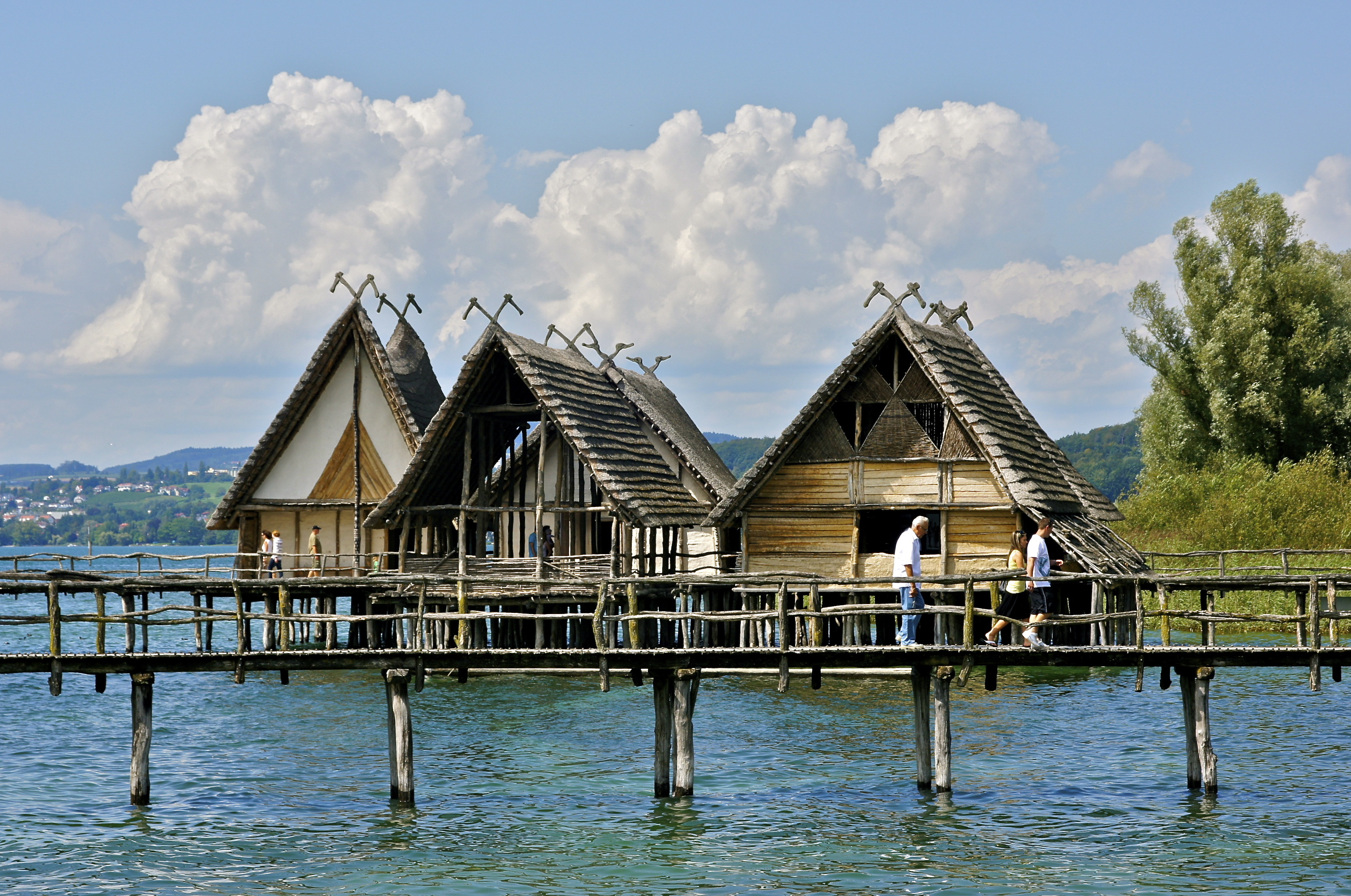 Die Pfahlbausiedlung Unteruhldingen ist ein archäologisches Freilichtmuseum. Es liegt am und im Bodensee in Baden-Württemberg. Die ersten Bauten wurde bereits 1922 unter wissenschaftlicher Leitung errichtet. Heute besuchen bis zu einer Viertelmillionen Menschen jährlich die Anlage. Das Museum besteht im wesentlichen aus den folgenden Teilbereichen: 1) Steinzeithäuser (Riedschachen). 2) Steinzeitliche Dorf (Sipplingen). 3) bronzezeitlichem Dorf (Buchau). 4) Hornstaad Haus und Arbon Haus. Das Hornstaadhaus wurde 1996 in Zusammenarbeit mit der Fernsehsendung 'Sendung mit der Maus' errichtet. Die gesamte Anlage gehört zum Weltkulturerbe